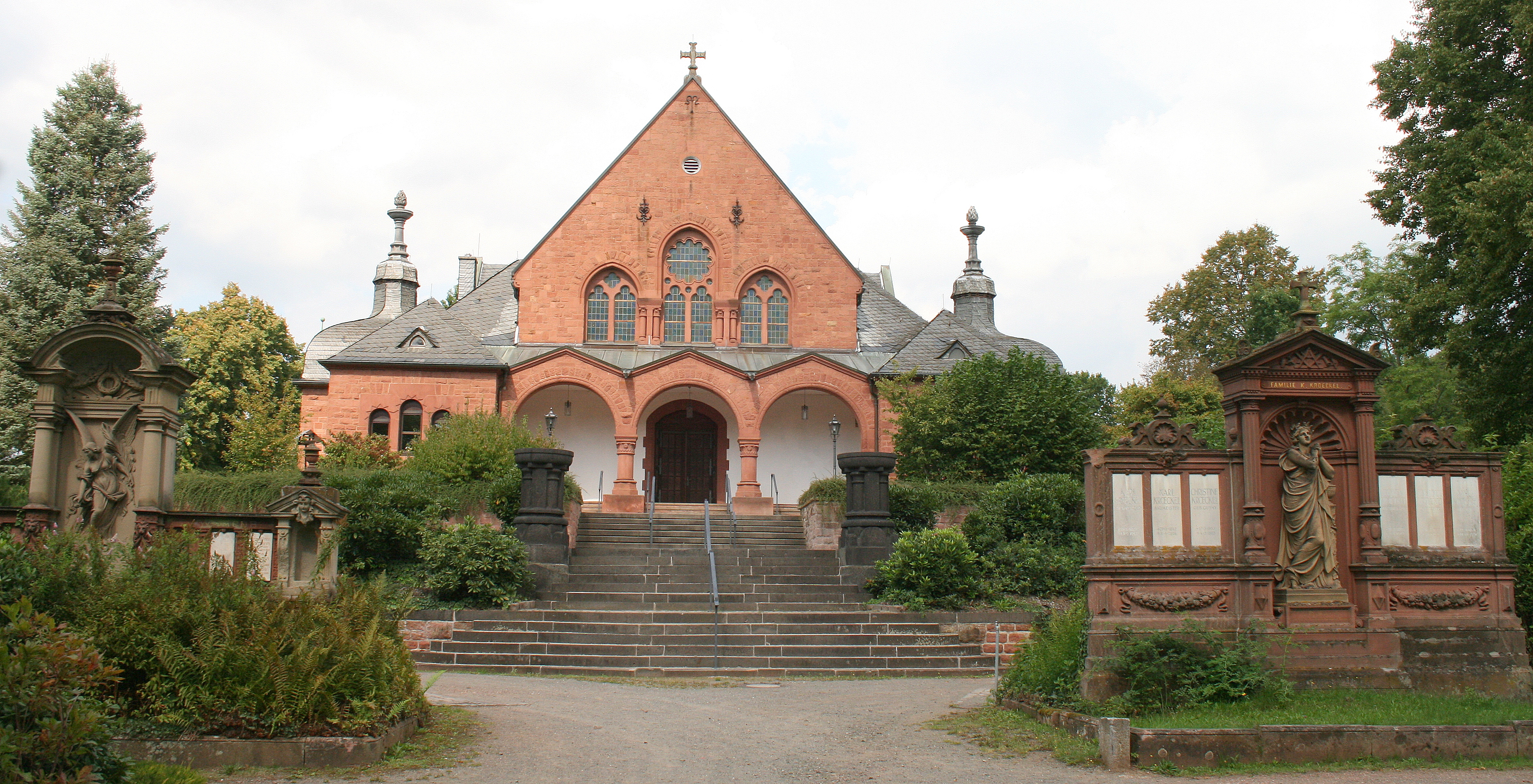 Friedhofskapelle